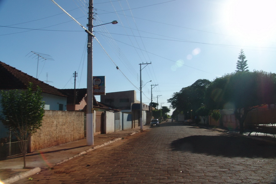 Imagem do município de Canitar, estado de São Paulo, Brasil.